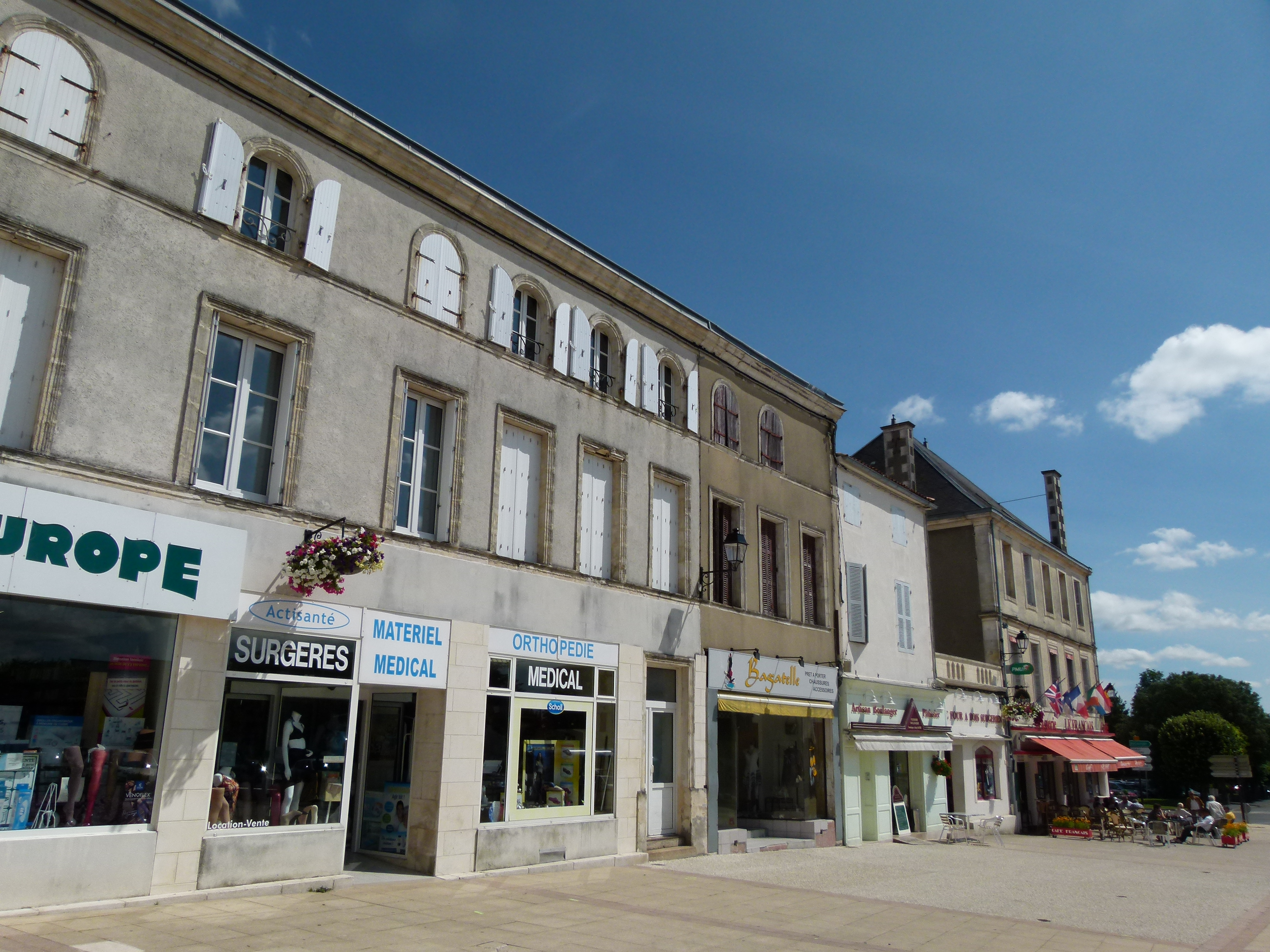 Les immeubles qui bordent la rue Bersot, artère piétonne de Surgères, ont été alignés au XIXe siècle, puis rénovés au siècle suivant.